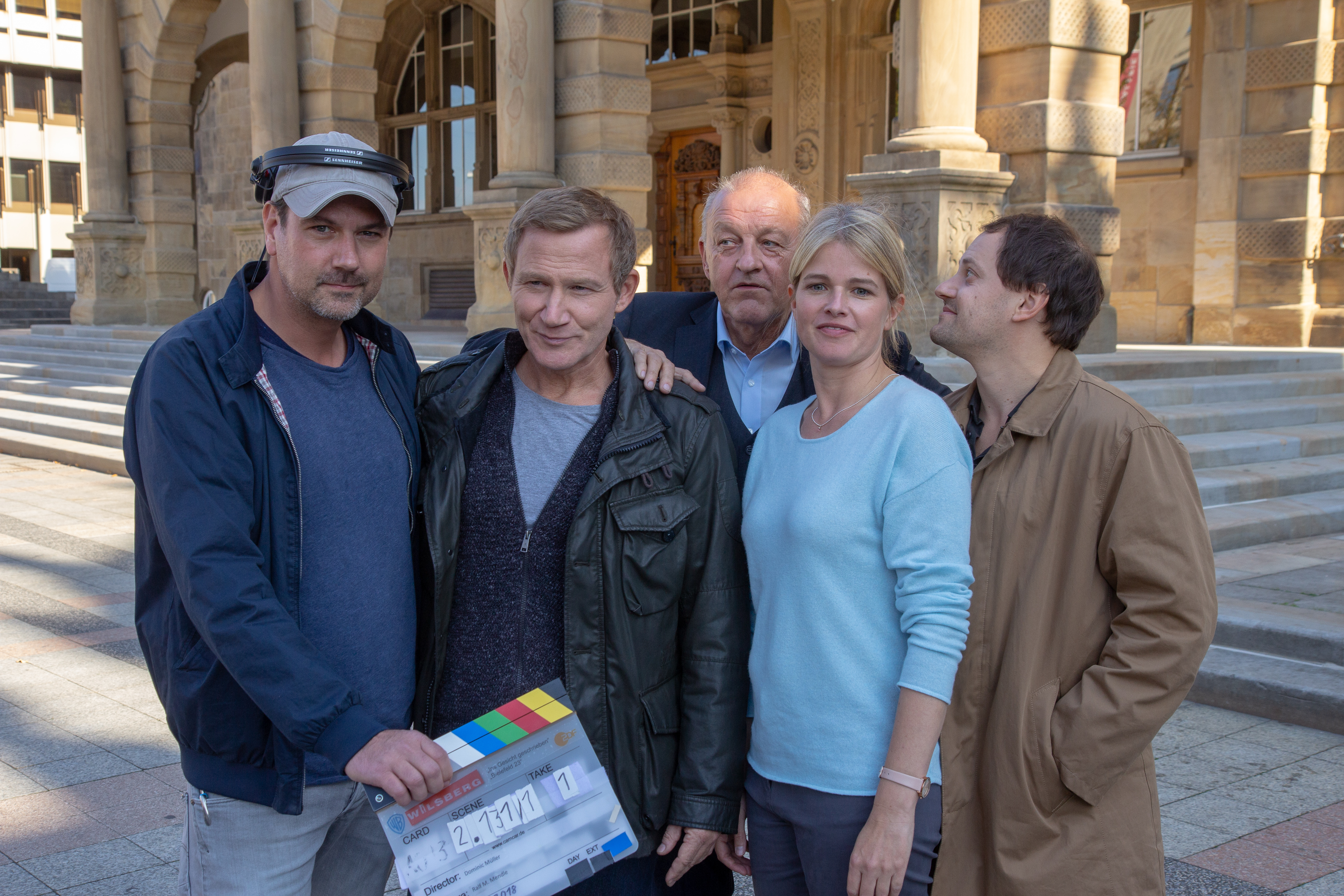 Pressetermin am Set "Wilsberg" am Alten Rathaus in Bielefeld am 15. Oktober 2018. Gruppe: Dominic Müller, Roland Jankowsky, Leonhard Landsink, Mira Bartuscheck, Stefan Haschke